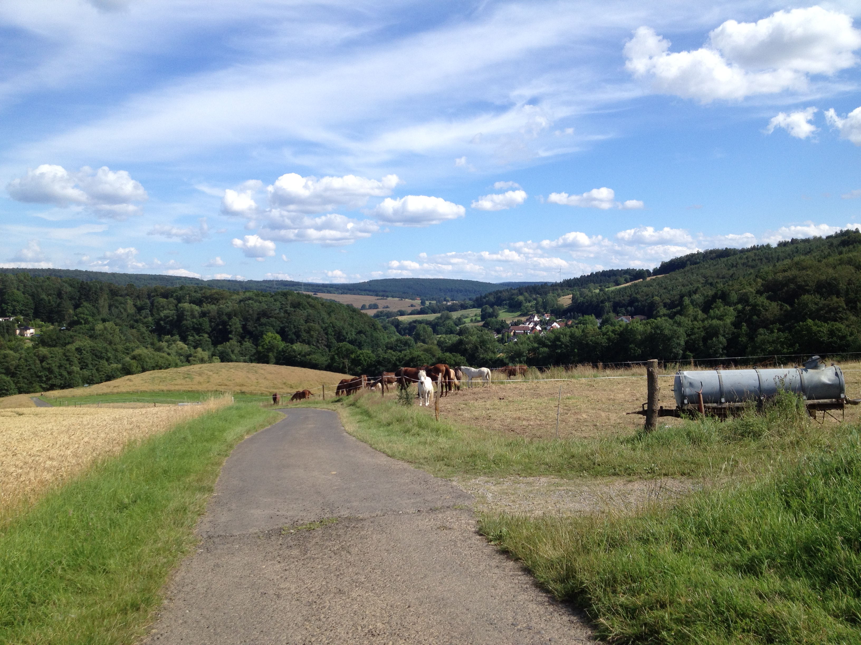 Die alte Wilhelmshäuser Straße nördlich von Knickhagen; Märchenland-Radrundweg